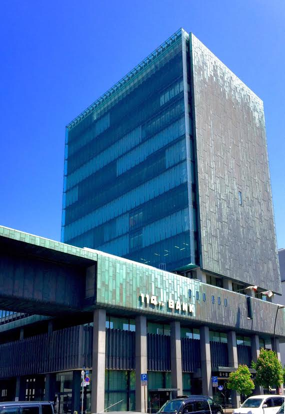 百十四銀行の本店ビル